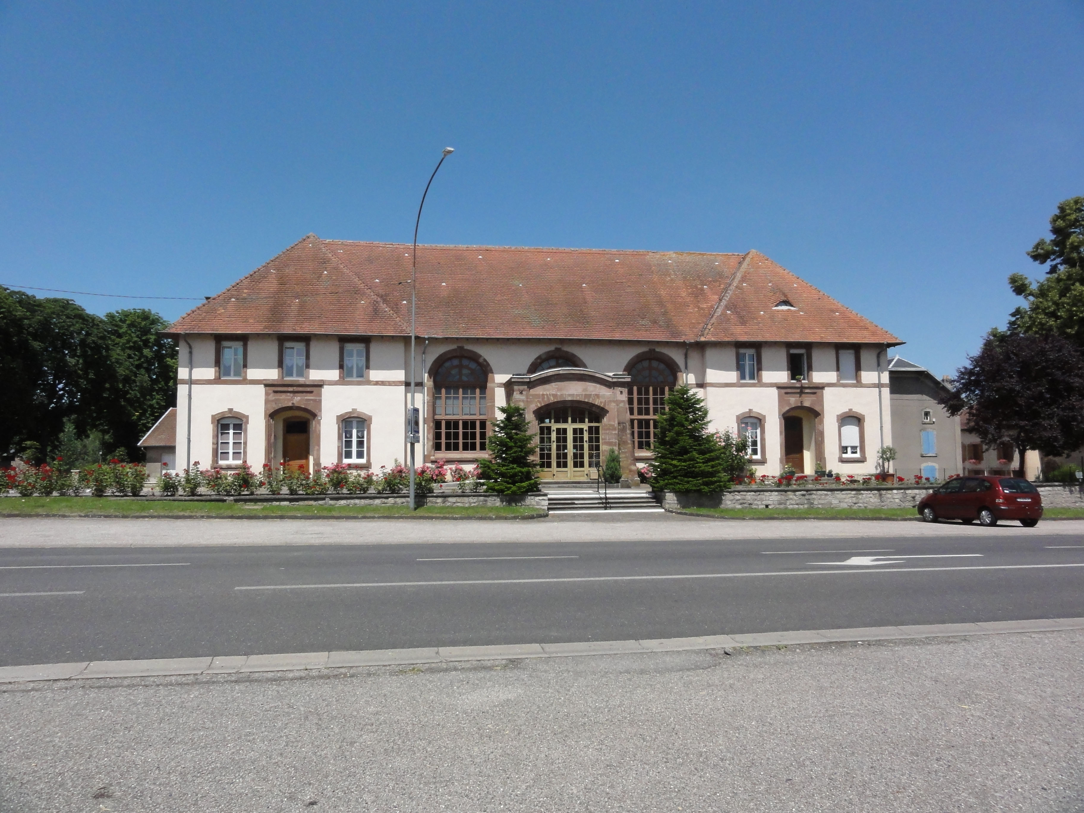 Domèvre-sur-Vezouze (M-et-M) mairie